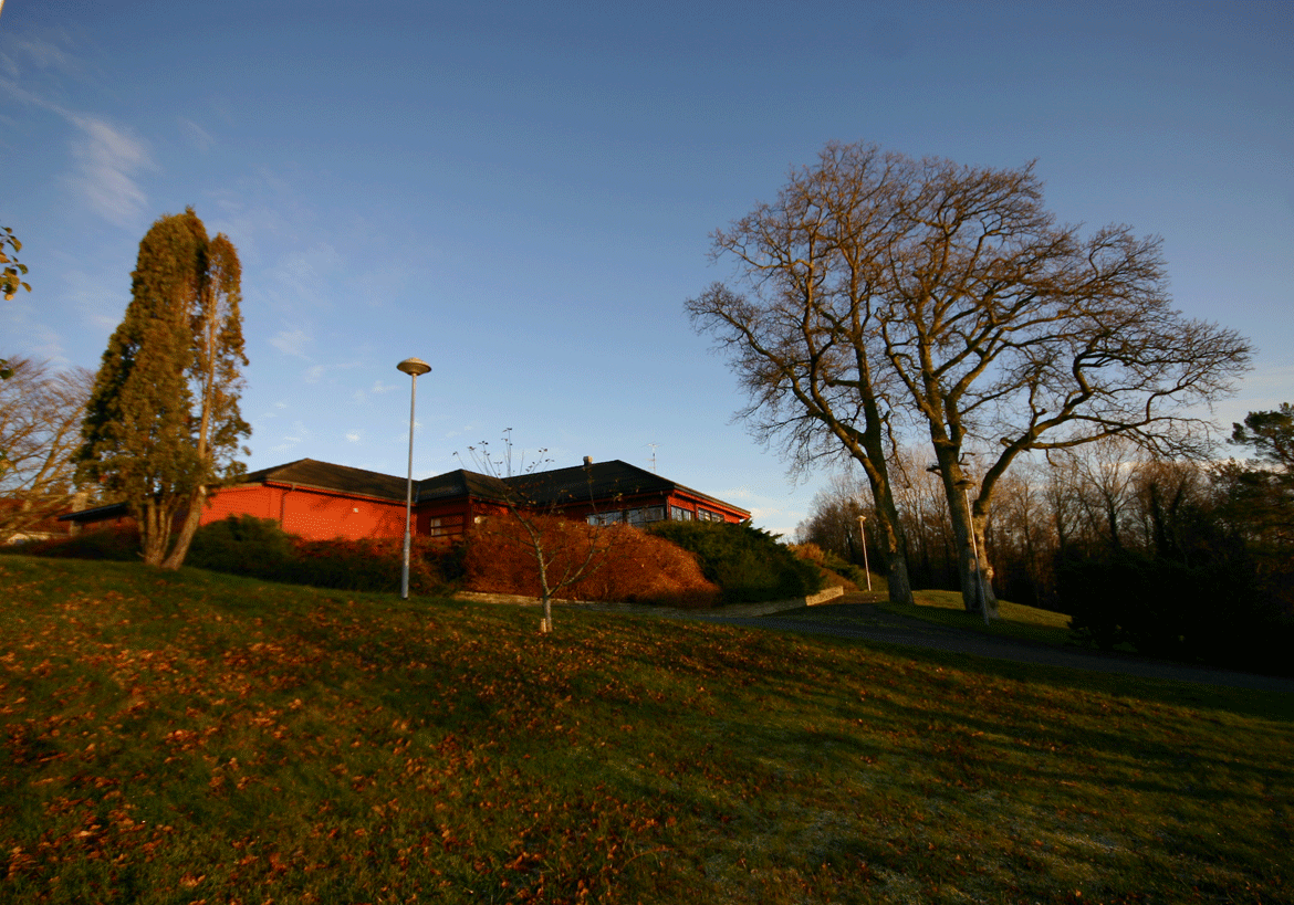 Sunnhordland folkehøgskule - Tunstova